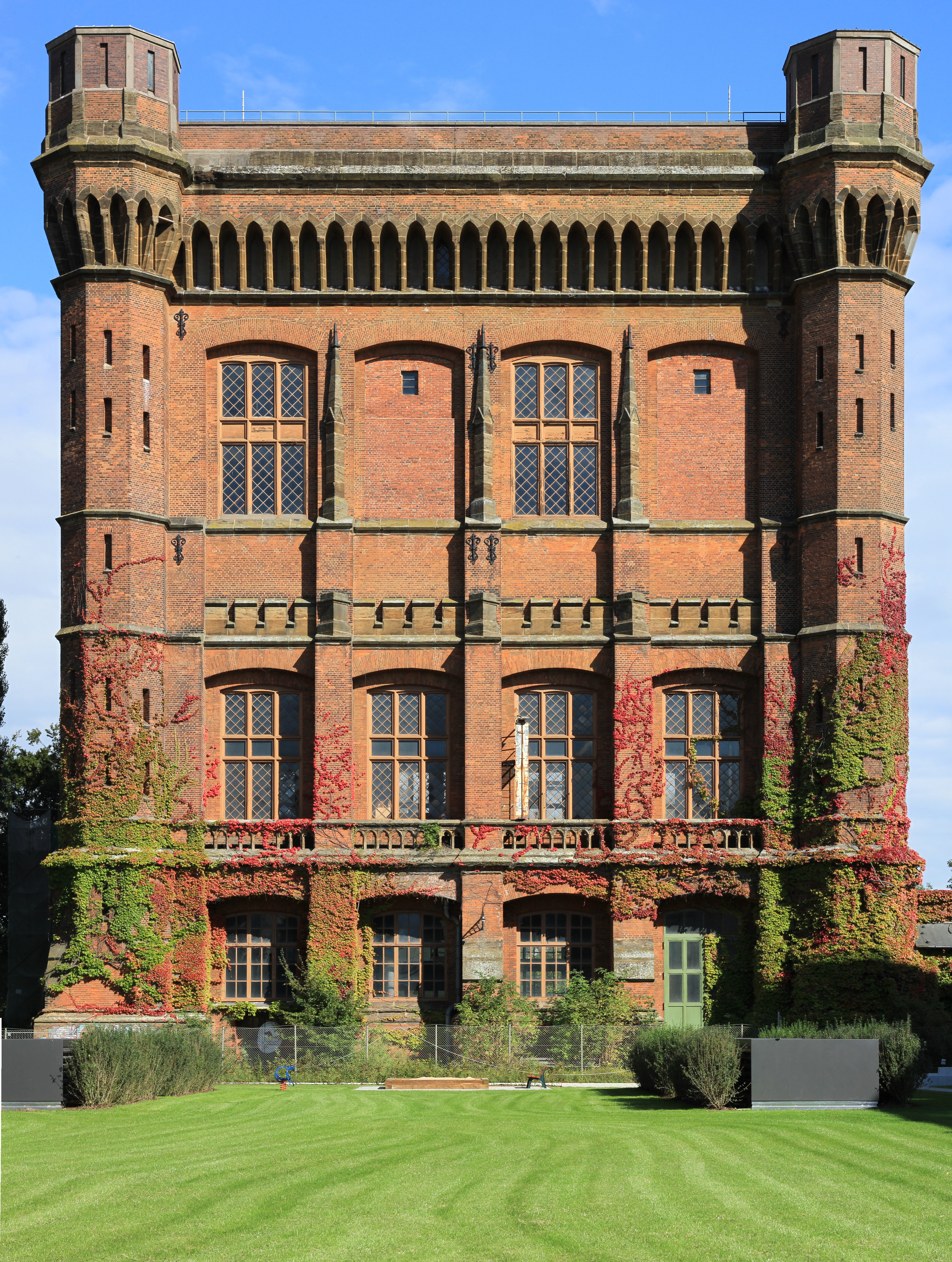 Wasserturm auf dem Werder in Bremen, Werderstraße 101Das abgebildete Objekt ist ein geschütztes Kulturdenkmal in der Freien Hansestadt Bremen, mit der Nr. 1221 beim Landesamt für Denkmalpflege registriert.